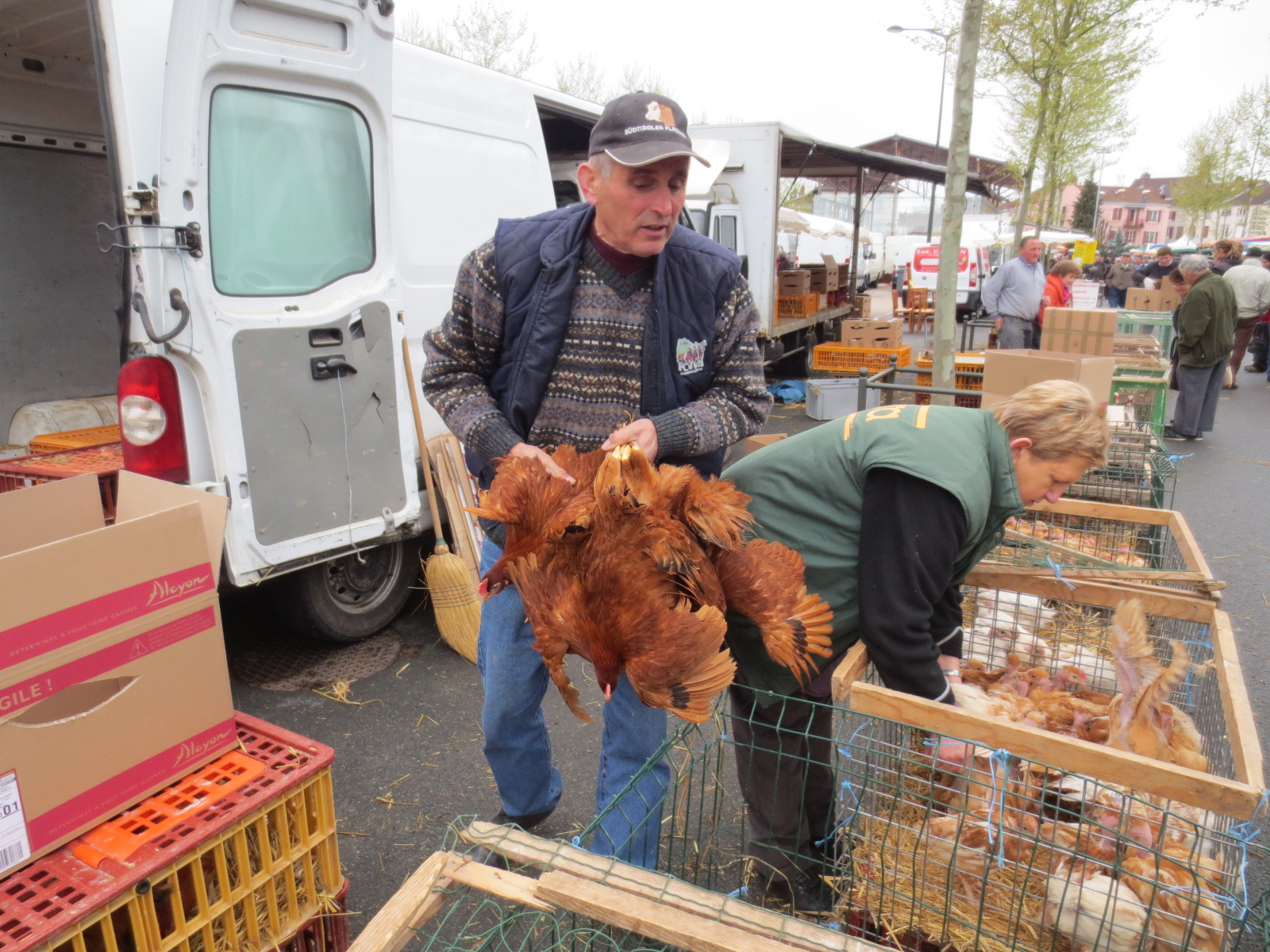 Markets in Louhans